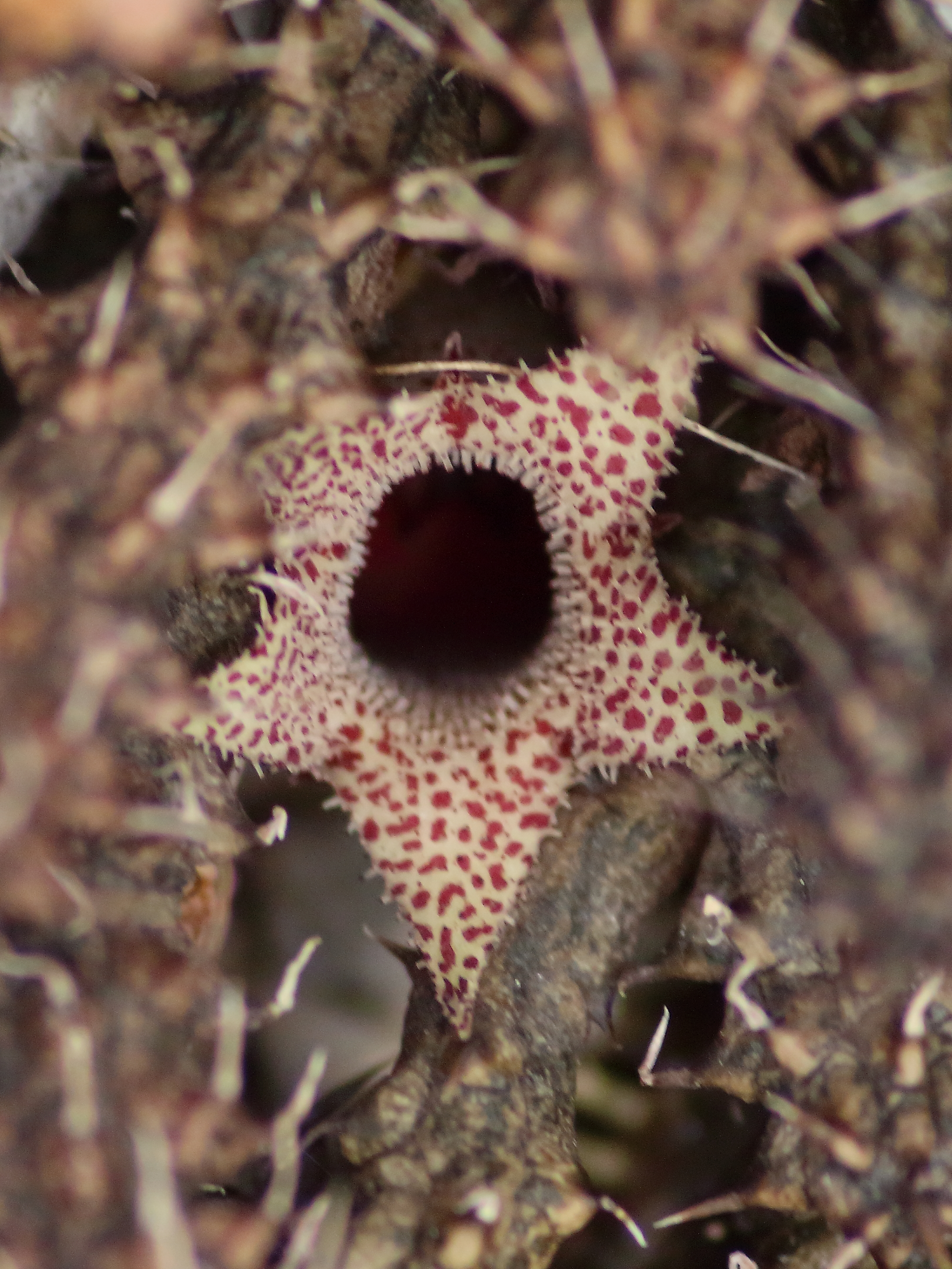 Stapelianthus decaryi au Conservatoire botanique national de Brest.